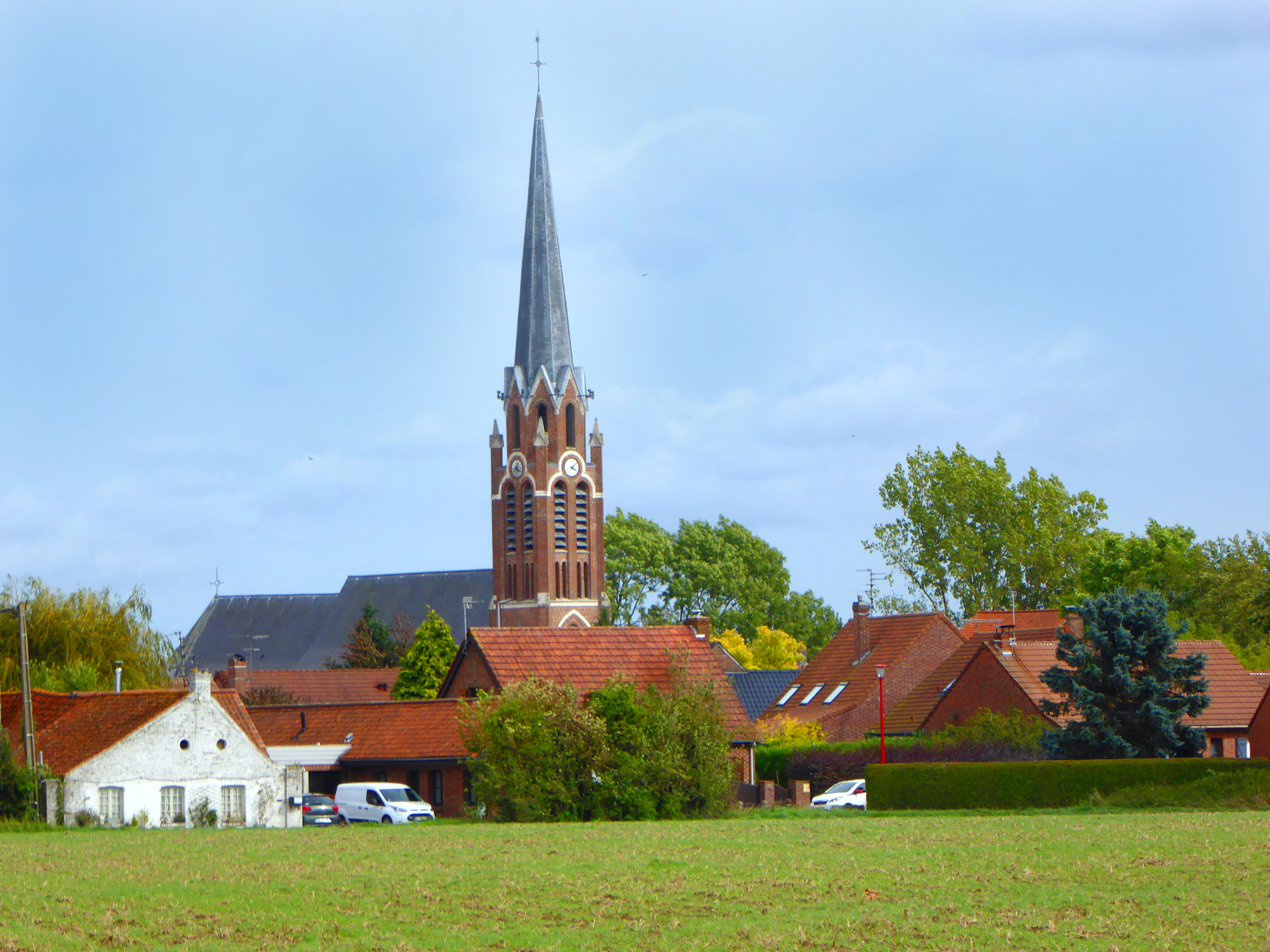 l'église Sant-Amand de Mérignies Nord Hauts-de-France